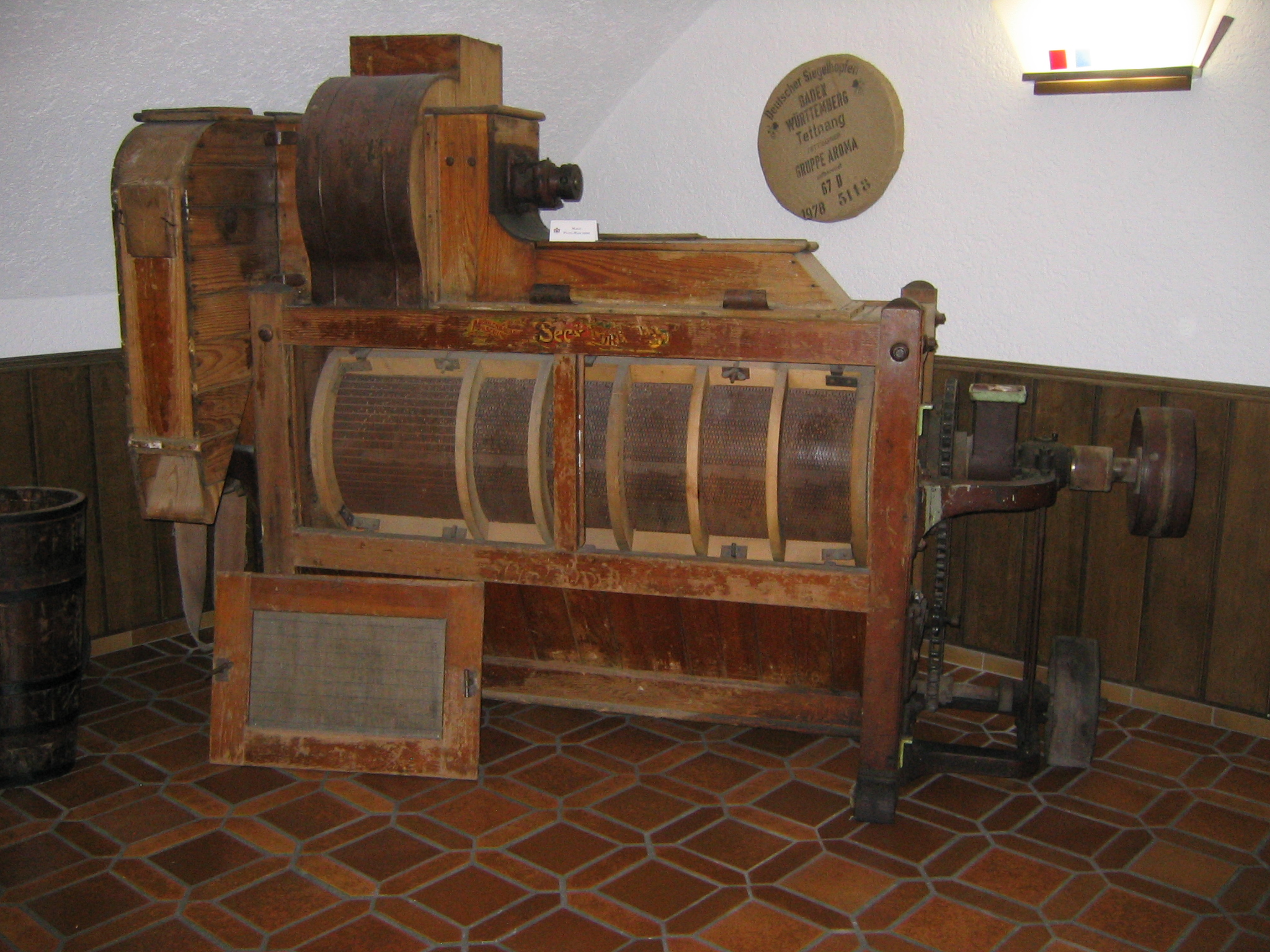 Malz-Putz-Maschine, aufgenommen während einer Brauerei Besichtigung bei Fürstenberg in Donaueschingen